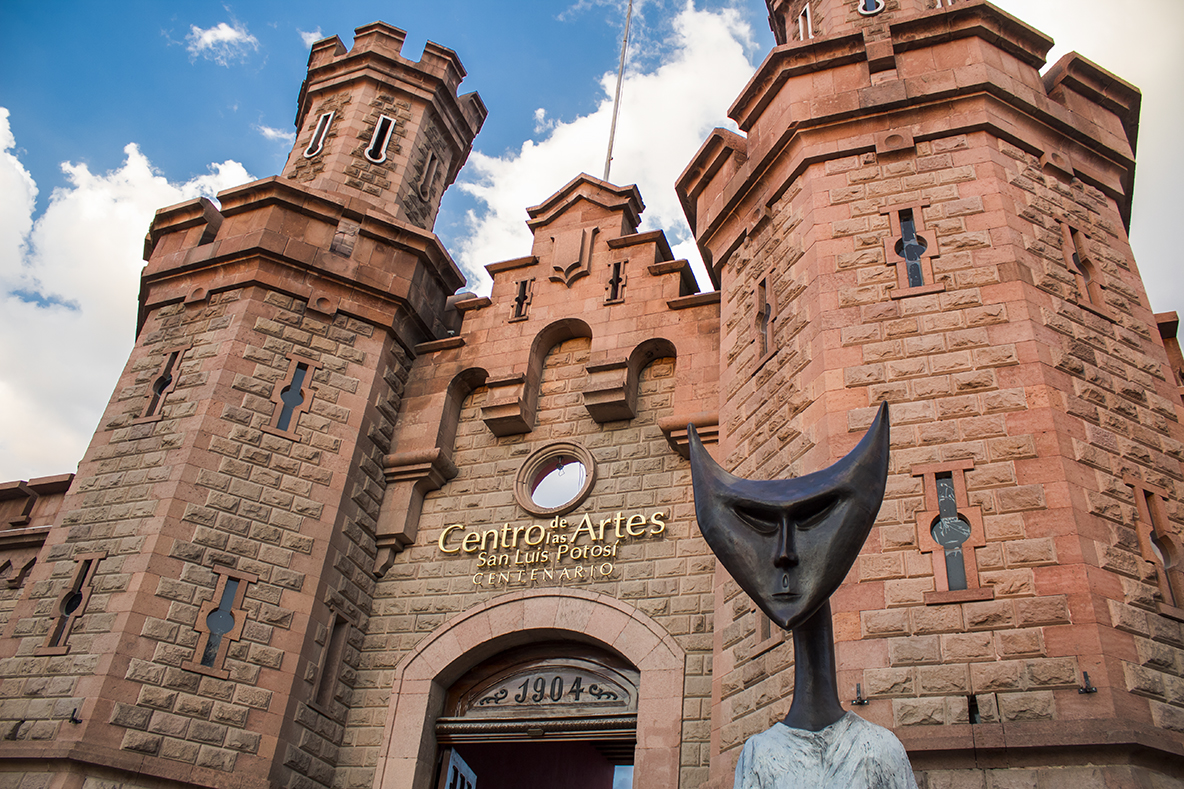 "La inventora del atole", escultura monumental de Leonora carrington en la entrada principal del Centro de las Artes potosino